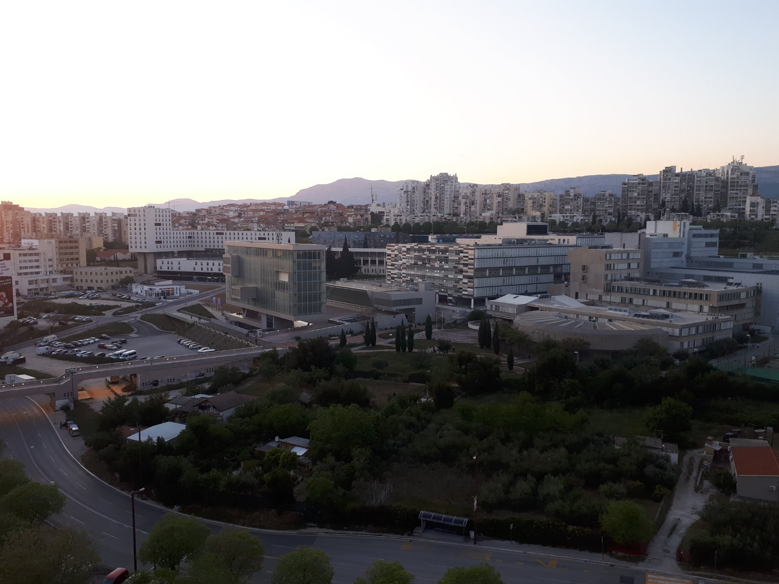 Na slici se nalazi kampus: Sveucilisna knjiznica, FEZB, studentski dom Kampus, PMF, Fakultet građevine, arhitekture i geodezije, te Ekonomski fakultet